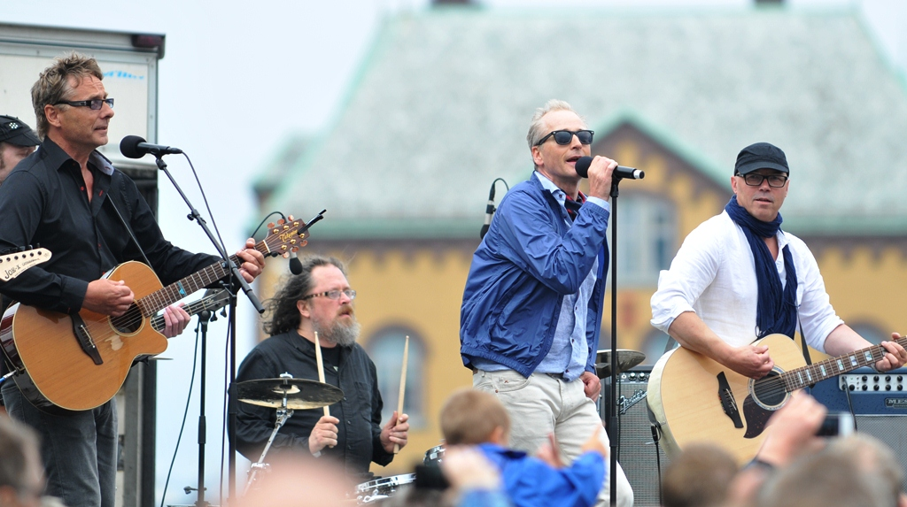 Mods under en utendørs promo-konsert i Stavanger 30.6.2012.